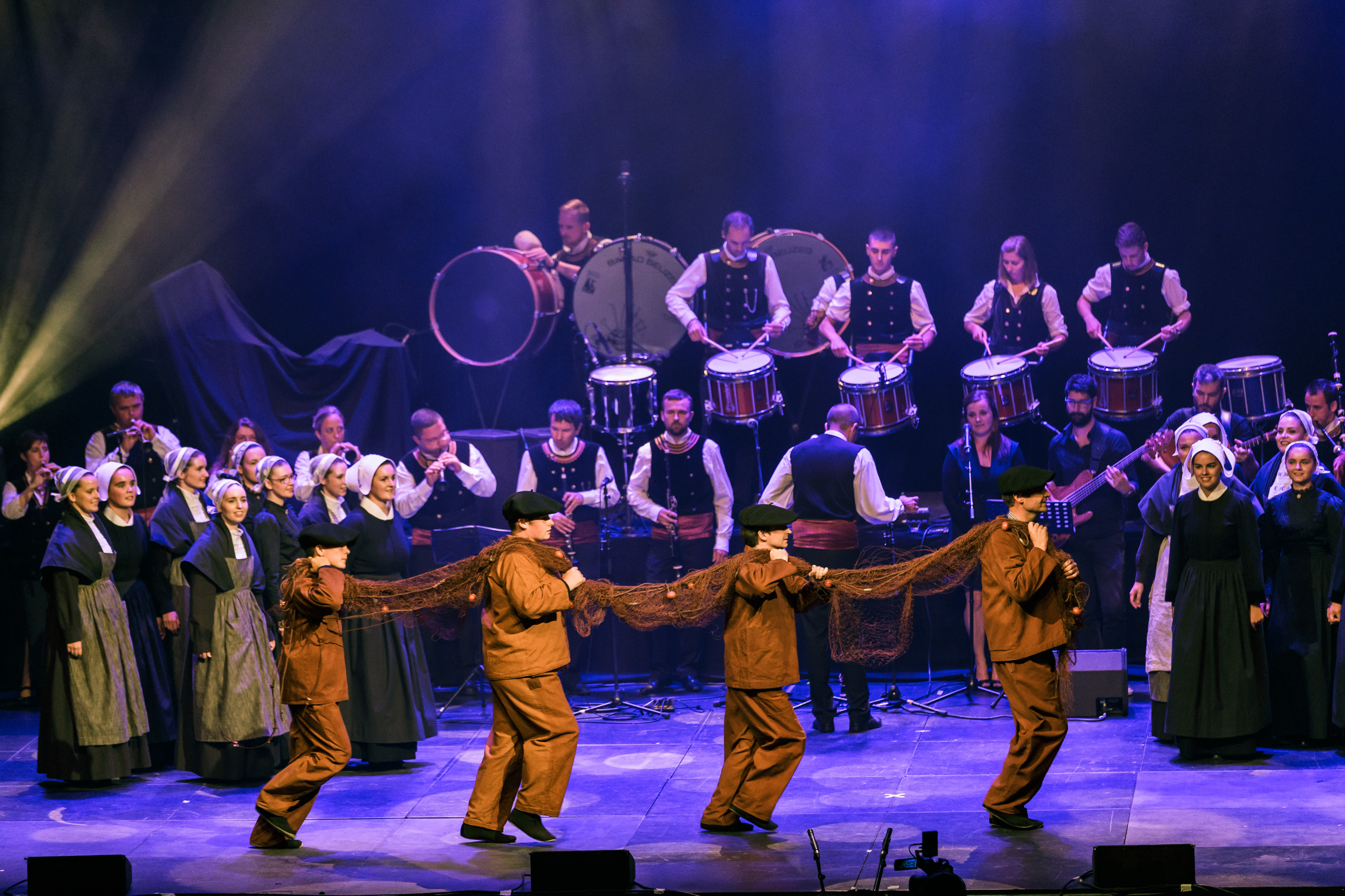 Le cercle des Bruyères de Beuzec-Cap-Sizun lors du spectacle Kement Tu, organisé par la confédération de danse War’l Leur dans le cadre du Championnat de Bretagne au Pavillon de Penvillers à Quimper le 22 juillet 2017.